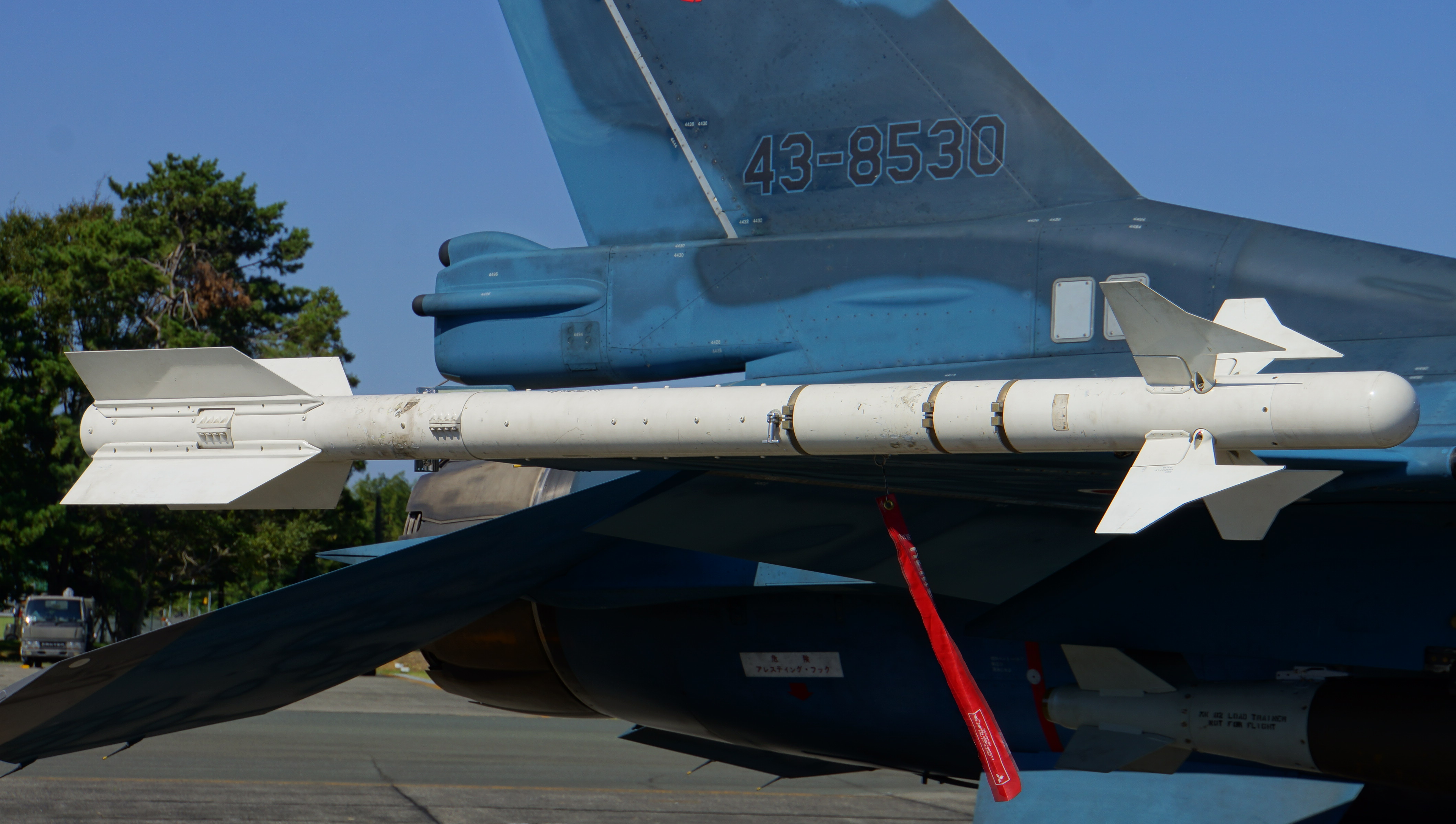 航空自衛隊 F-2A戦闘機に搭載されているAAM-3空対空ミサイル。 14年9月28日 浜松基地にて。